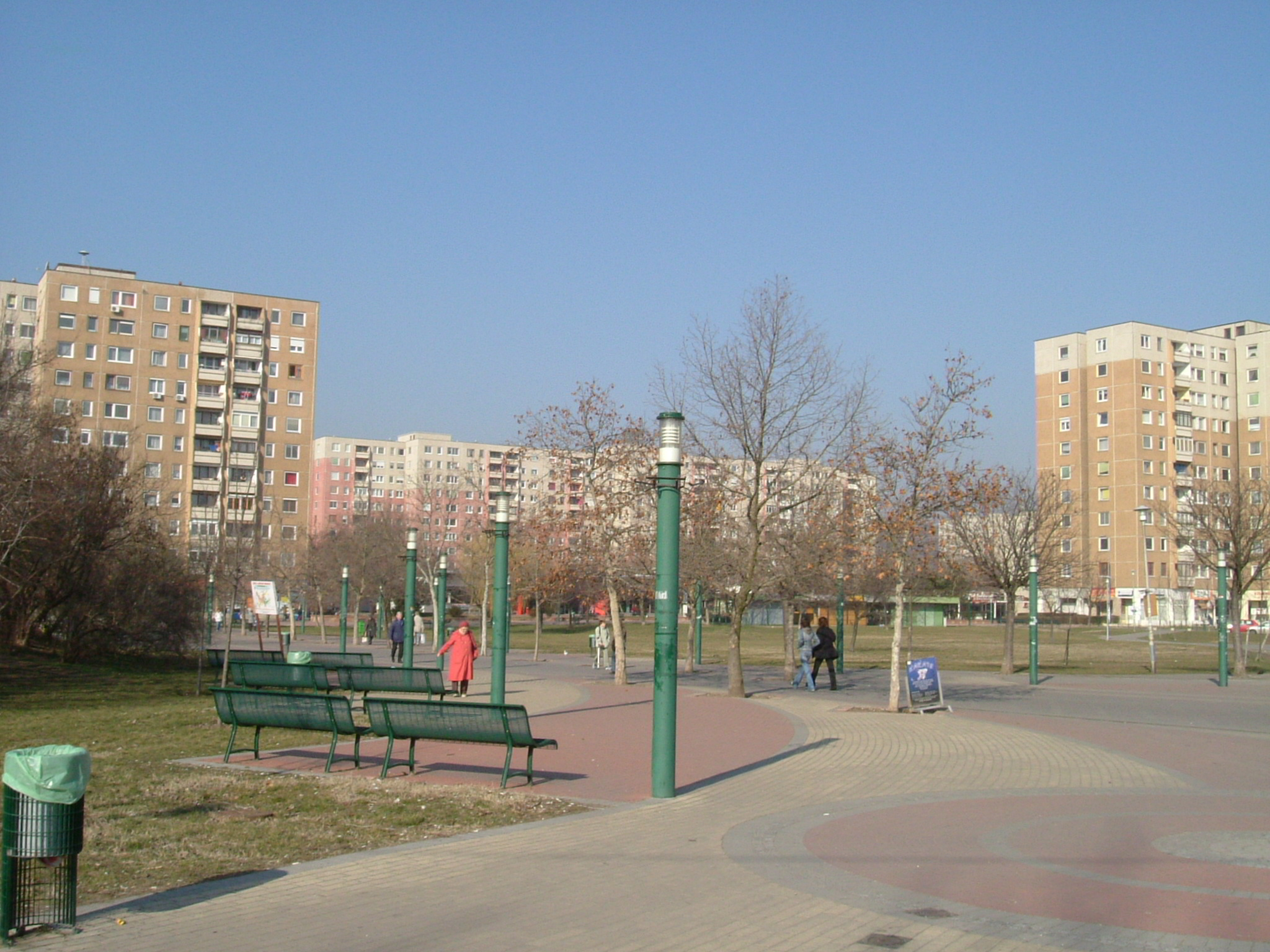 Békásmegyer hegy felőli oldalának látképe a HÉV megálló felől